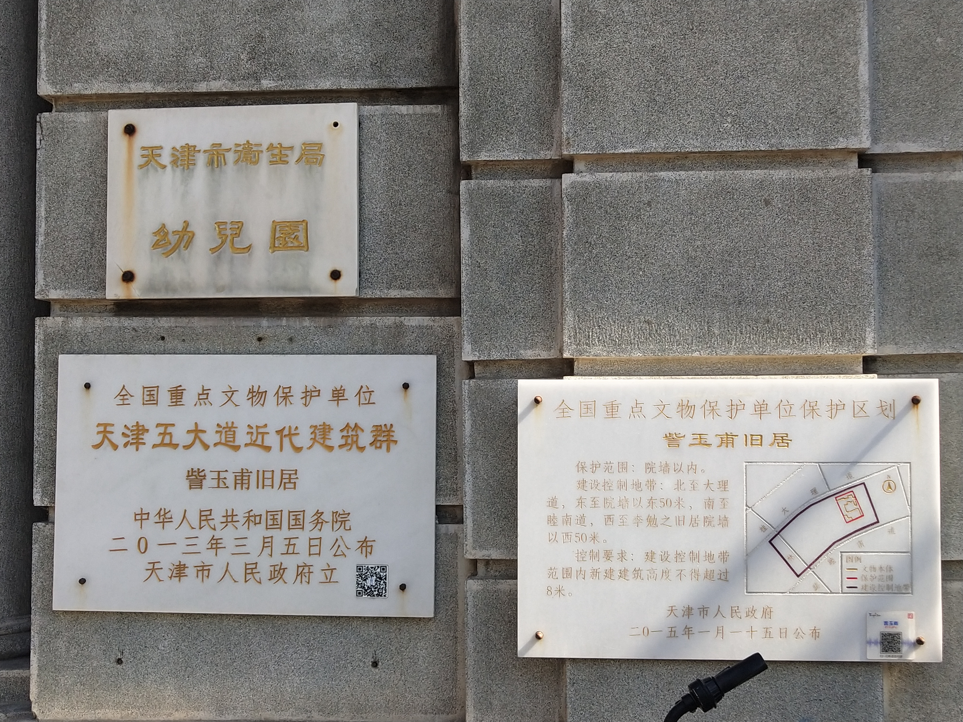 天津市訾玉甫旧居上的铭牌